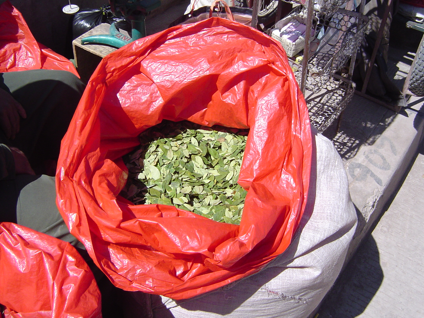 Bolivia coca leaves